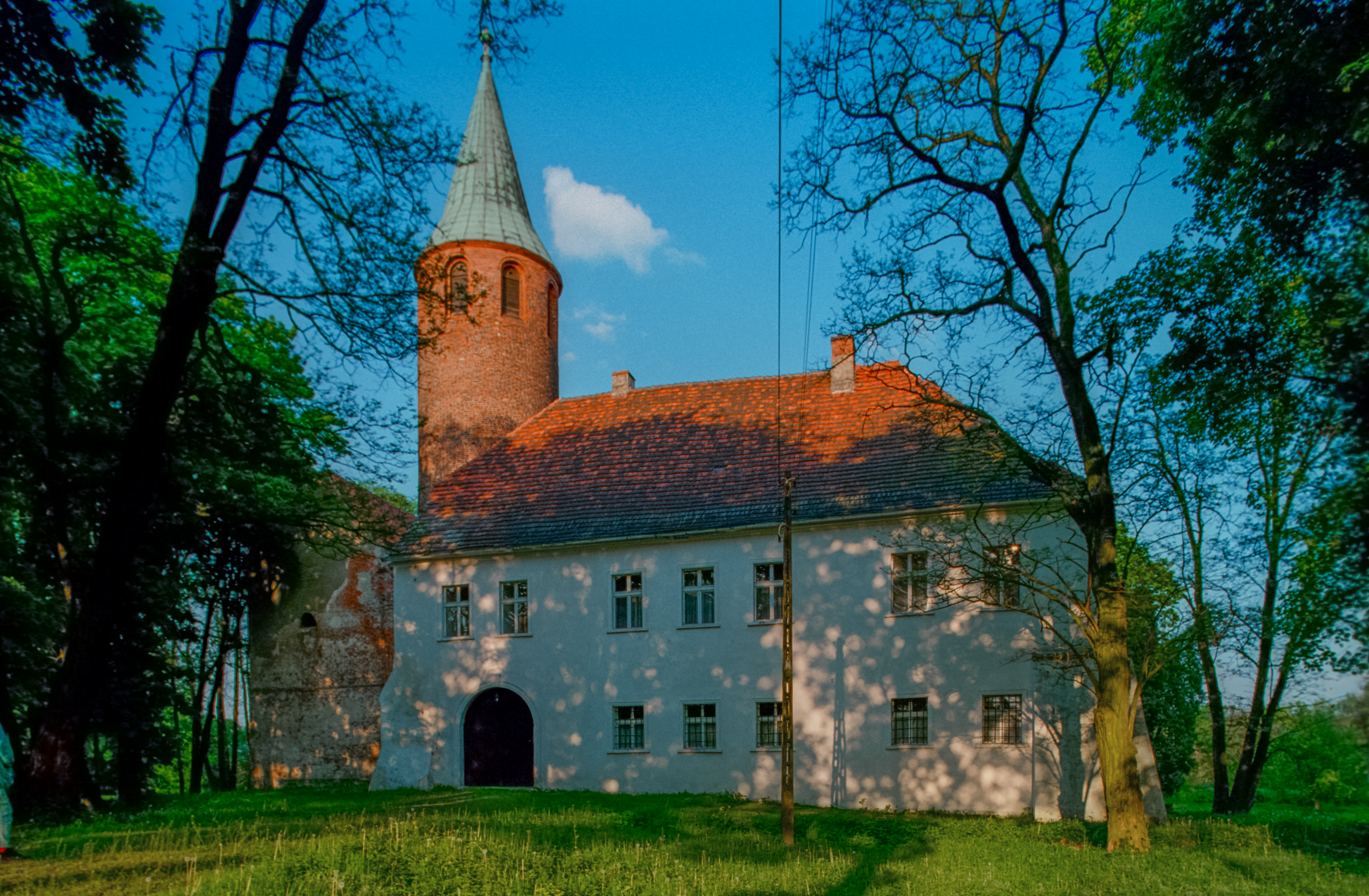 Karłowice